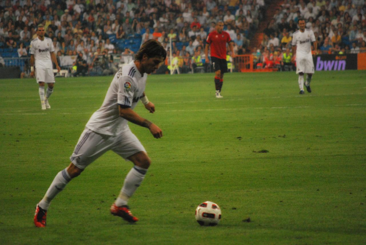 Real Madrid 1 - Osasuna 0 11 de septiembre 2010